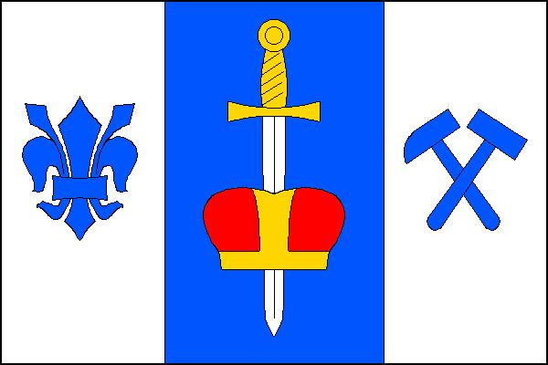 Vlajka obce Štěchov